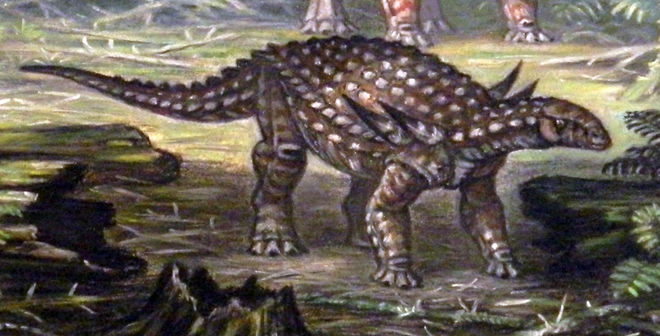 Silvisaurus.